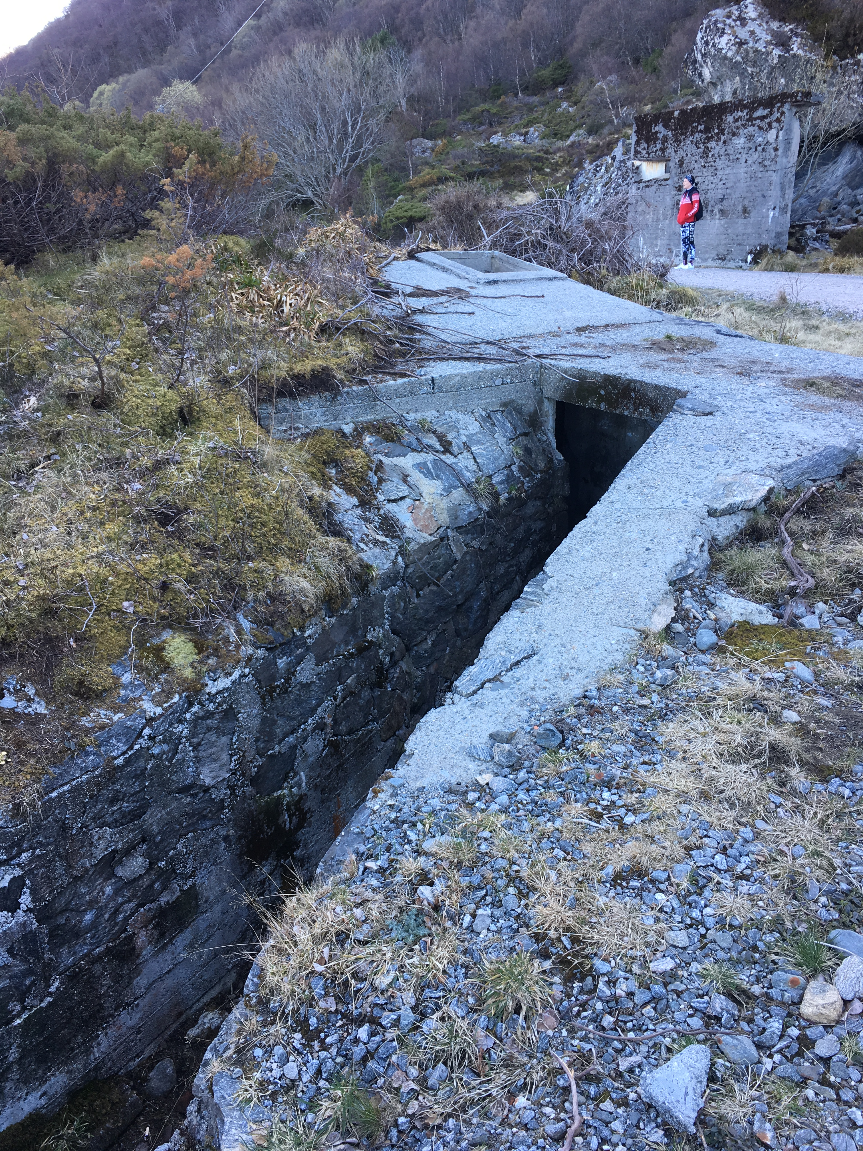 Løpegrav som leder opp fra en ammunisjons bunker opp mot en panservern stilling ved inngangspartiet på kvitneset